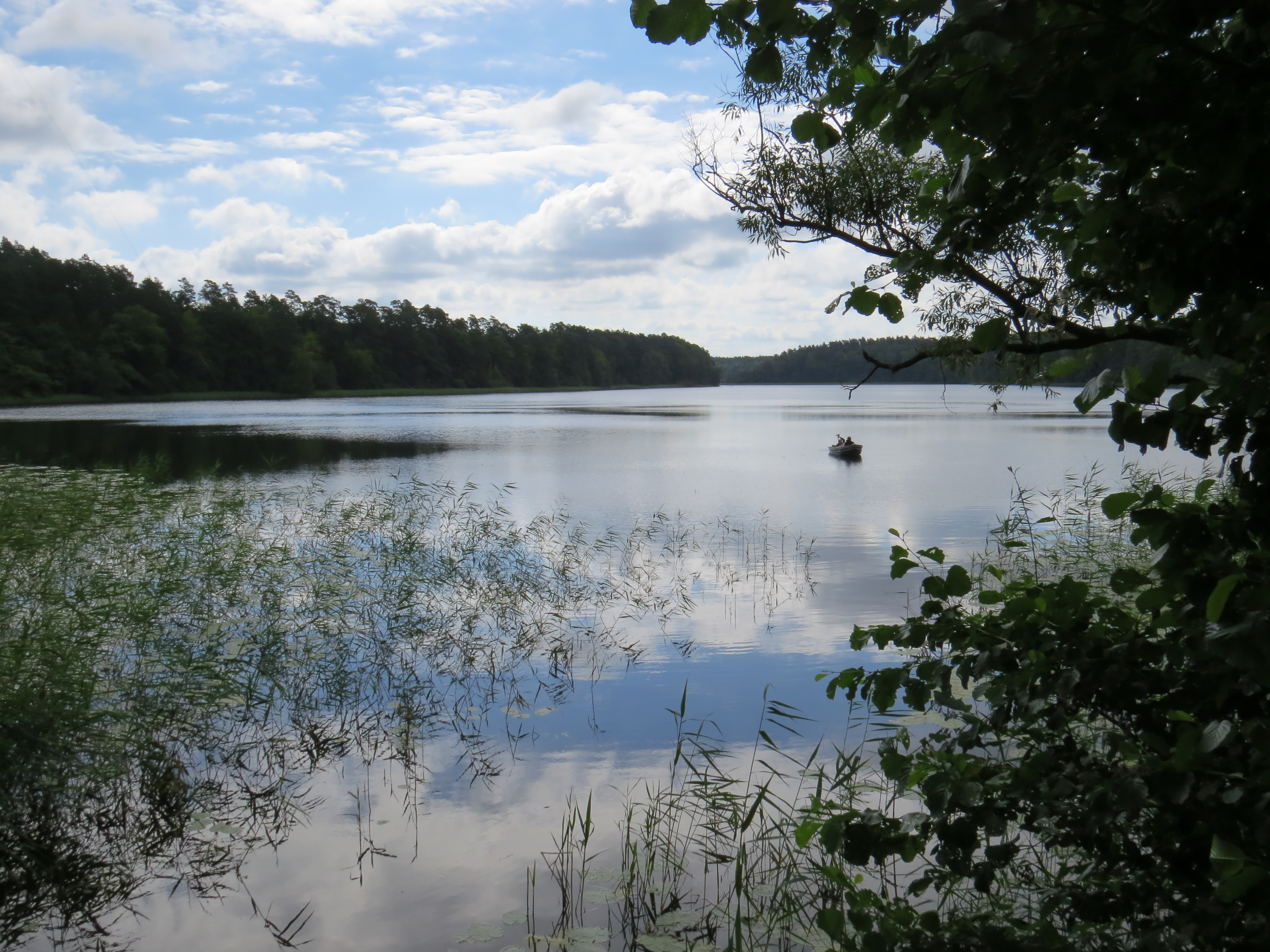 Lychen, Platkowsee